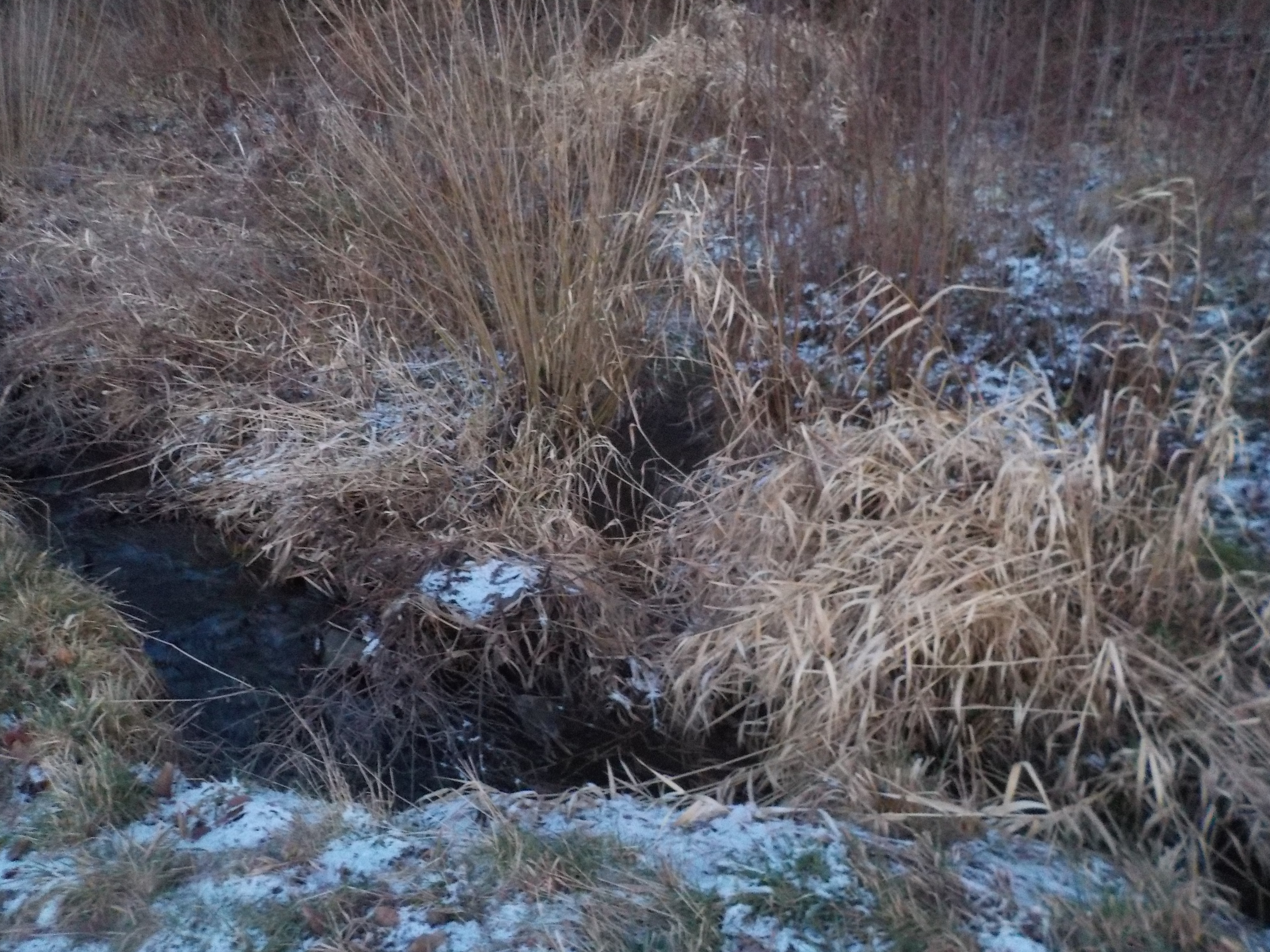 Zemanův žleb na soutoku s přítokem od Březové aleje